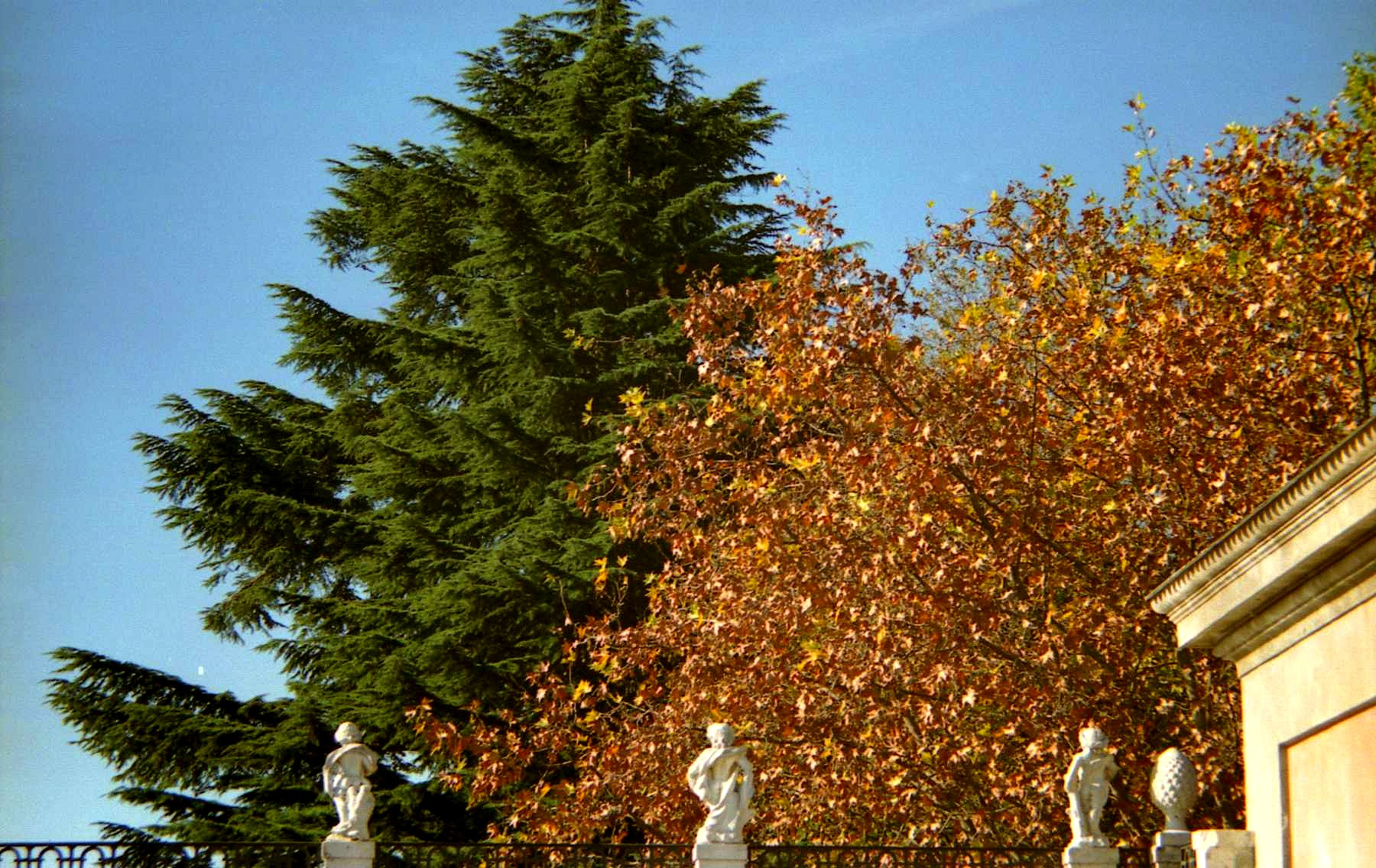 Alameda de Osuna (Madrid) Fotografía de mi álbum particular tomada el 10-noviembre-1987